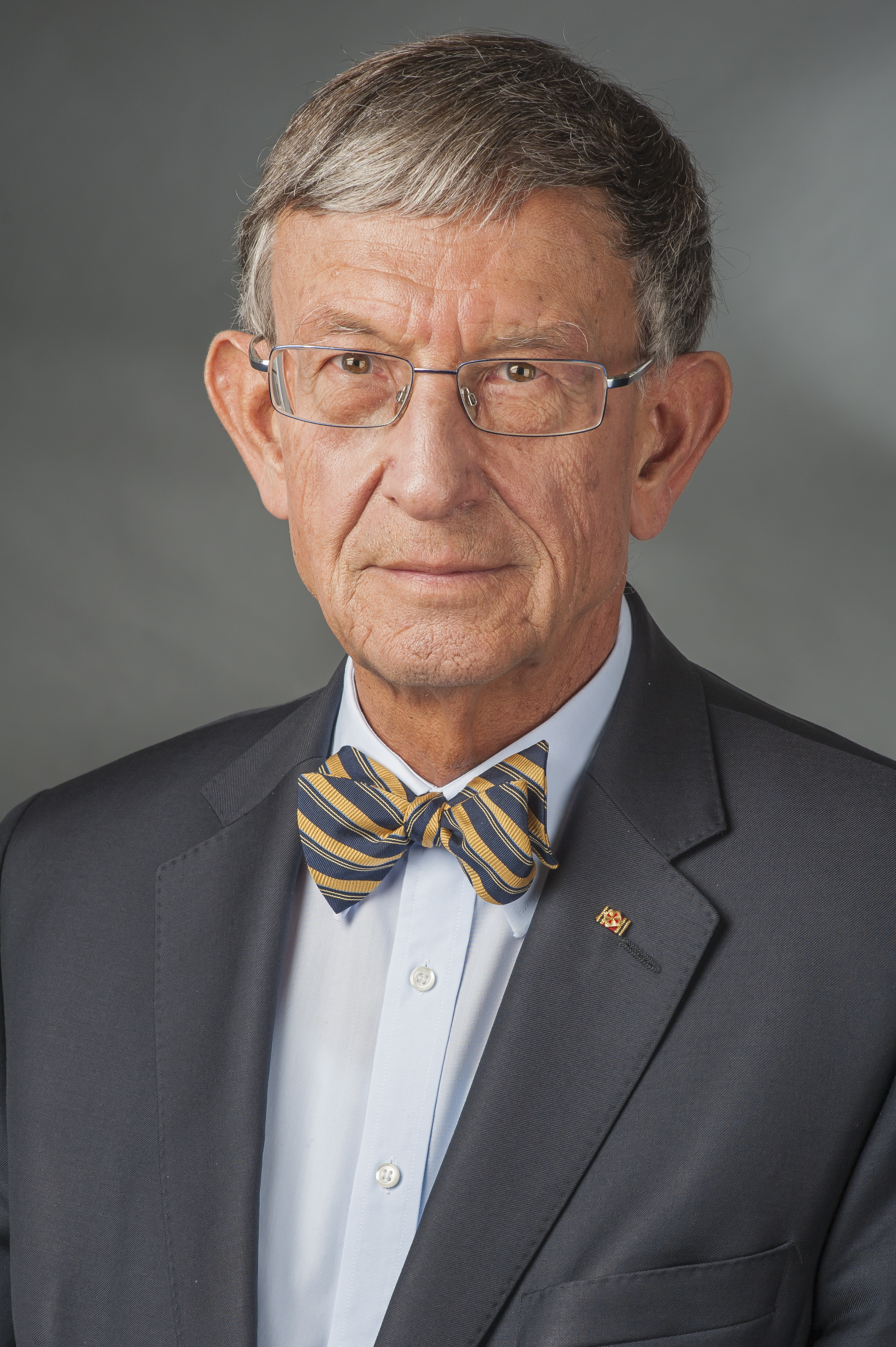 Heinz Riesenhuber (* 1. Dezember 1935 in Frankfurt am Main) ist ein deutscher Politiker (CDU). Als ältestes Mitglied im 17. Deutschen Bundestag (2009–2013) und im 18. Deutschen Bundestag (ab 2013) fungiert(e) er als Alterspräsident.